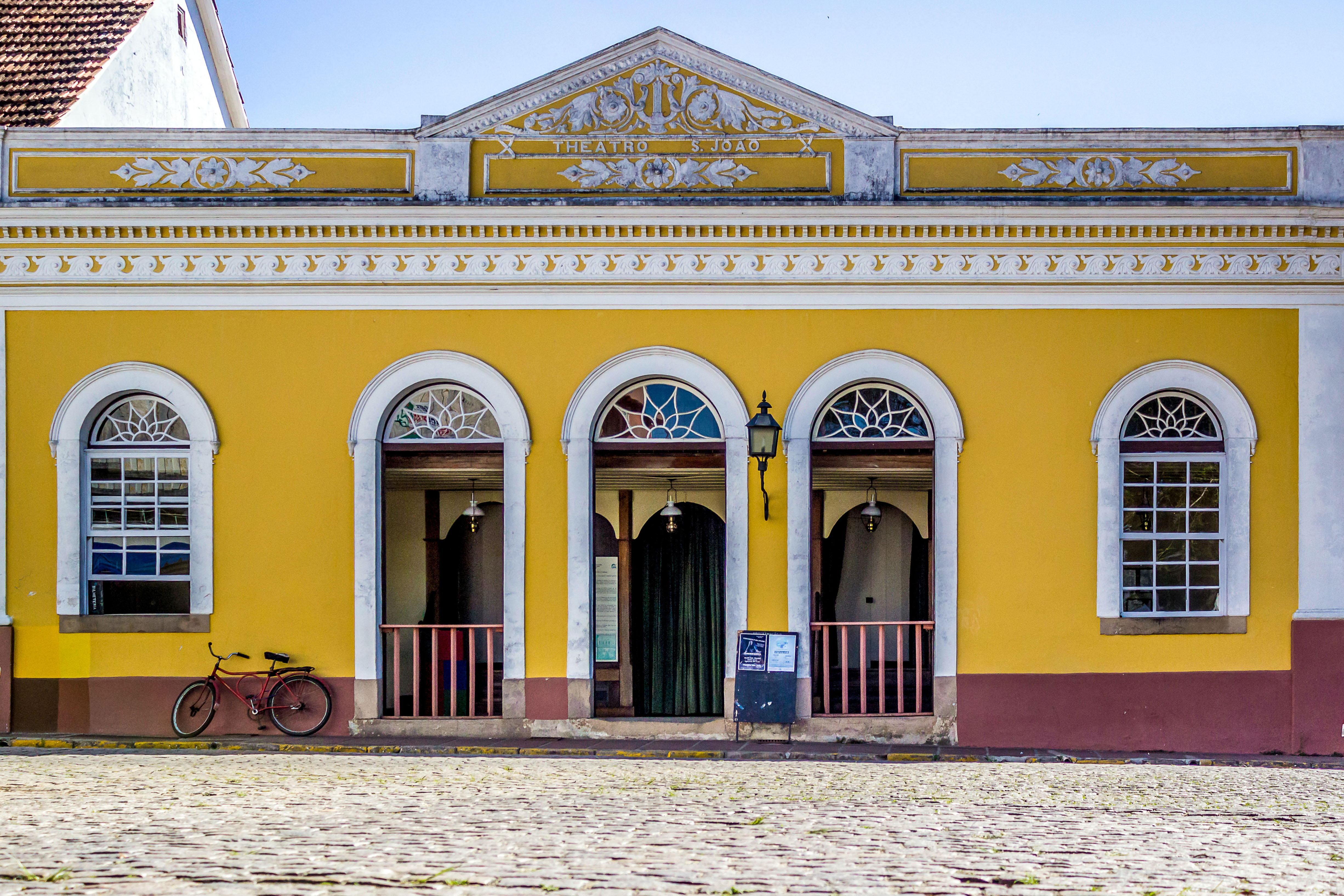 Construído em 1873, no estilo elisabetano, comporta cerca de 200 espectadores. Recebeu o Imperador D. Pedro em 1880. Também serviu de enfermaria durante a sangrenta batalha do “Cerco da Lapa”.